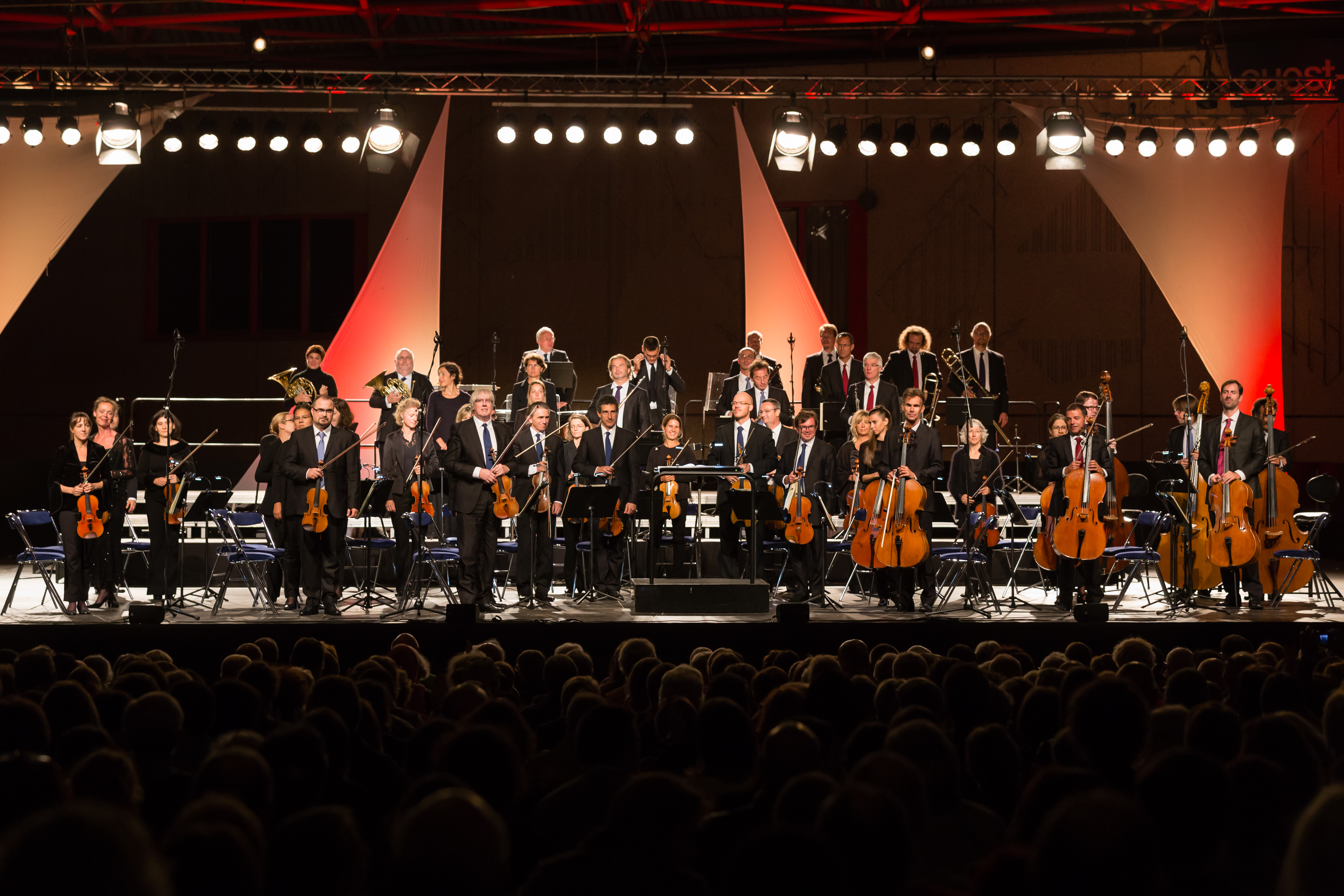 L'Orchestre symphonique de Bretagne salue après l'exécution de la symphonie n°6 dite La Pastorale, op. 68 de Ludwig van Beethoven.